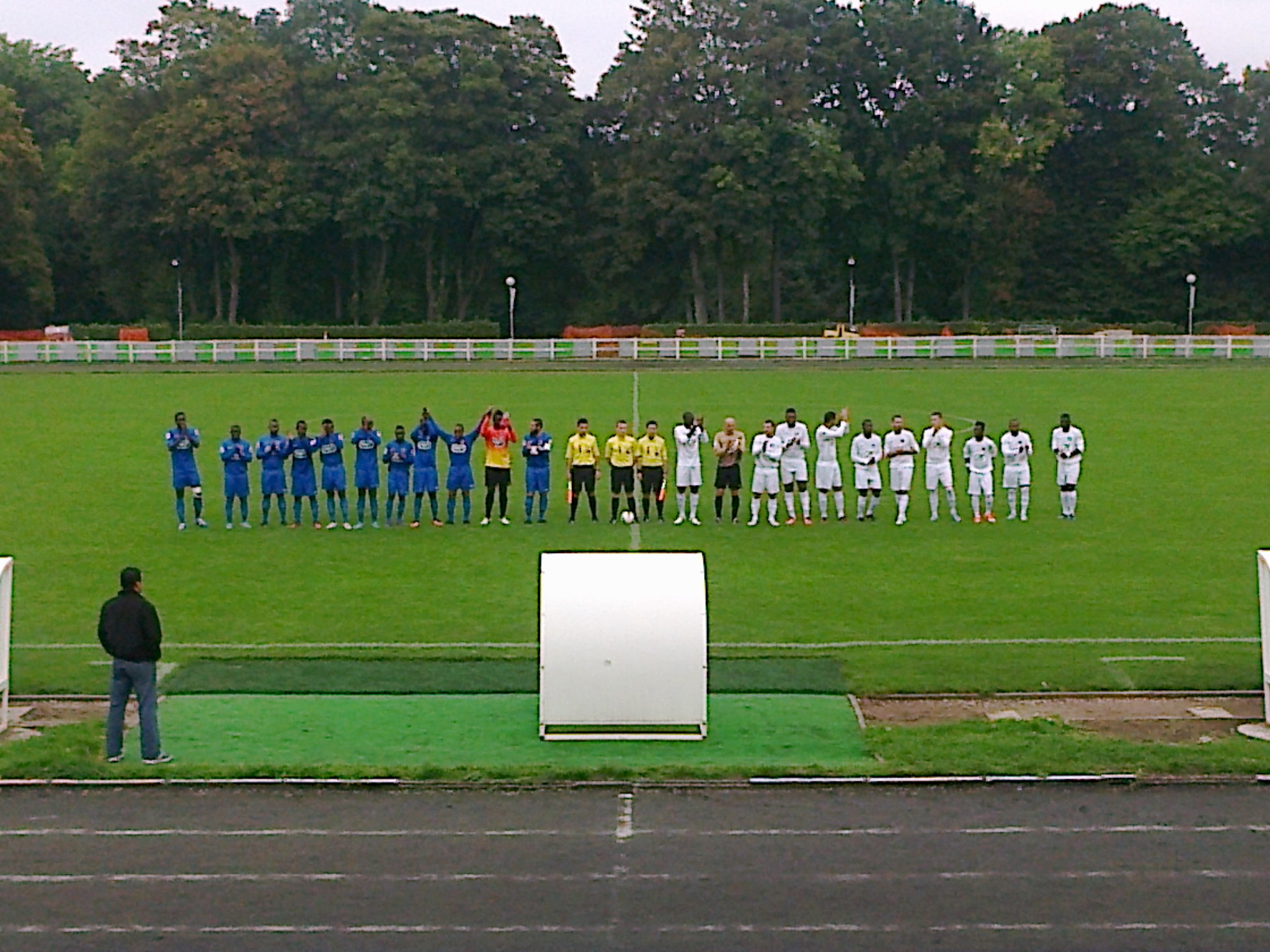 Présentation des équipes lors du match AC Boulogne-Billancourt - FC Issy en coupe de France 2014 du 29 septembre 2013 au stade Marcel-Bec de Meudon